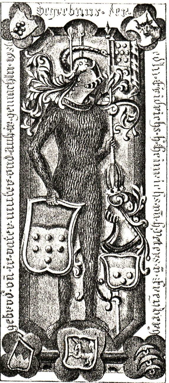 Grabmal für Friedrich, Heinrich und Peter von Freyberg, ihre Eltern (Friedrich von Freyberg und Anna von Hohhenegg) und ihre Gemahlinnen im Kloster Stams